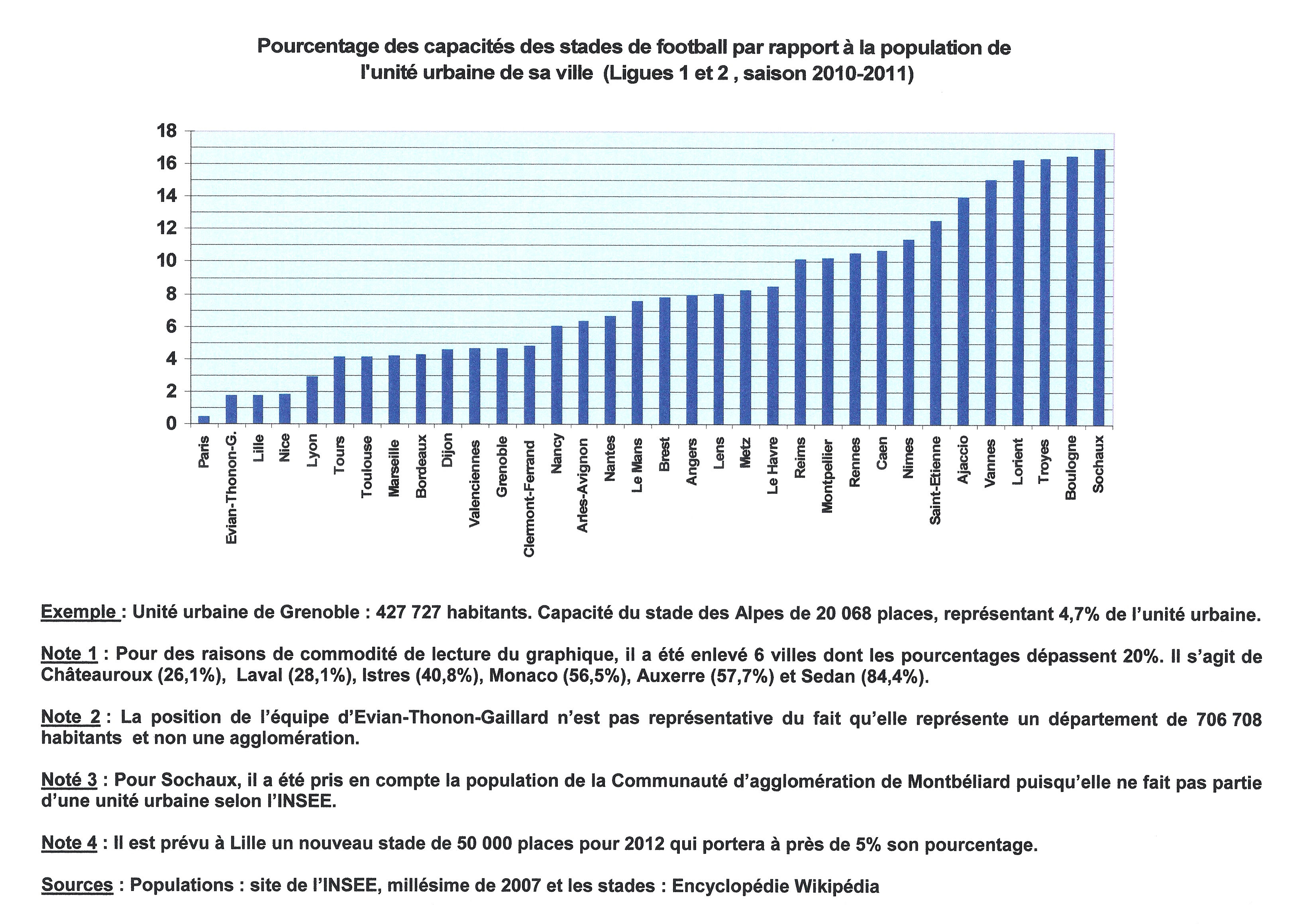 Graphique des capacités des stades en France en fonction de la population de l'unité urbaine.